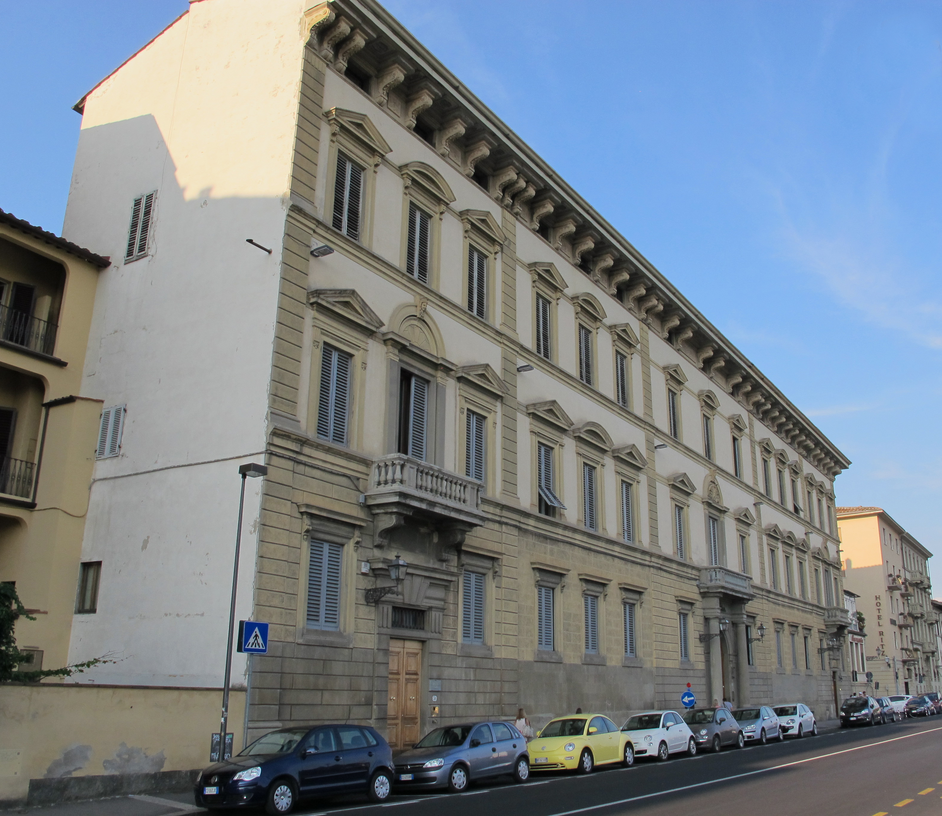 Lungarno della zecca vecchia 26-28-30